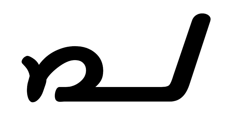 പ മലയാളം അക്ഷരം